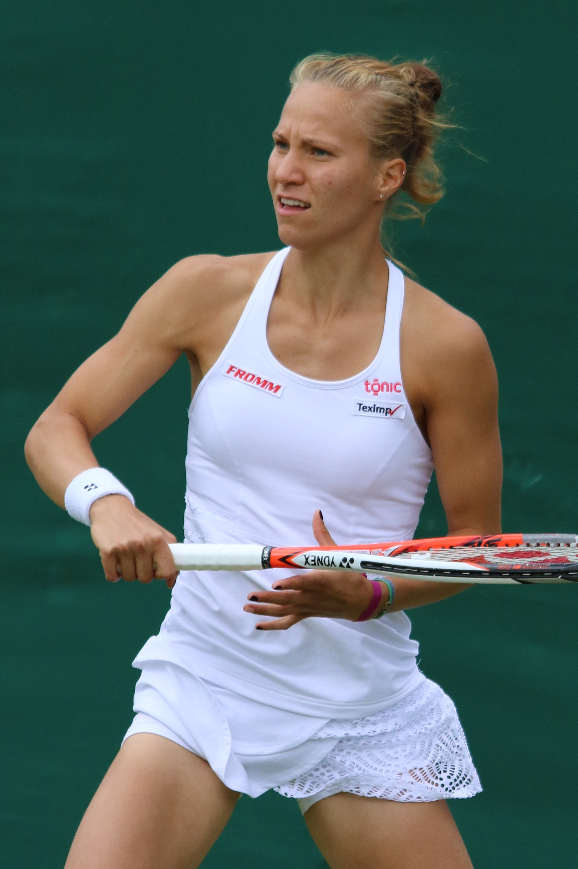 Golubic WMQ16 (1)